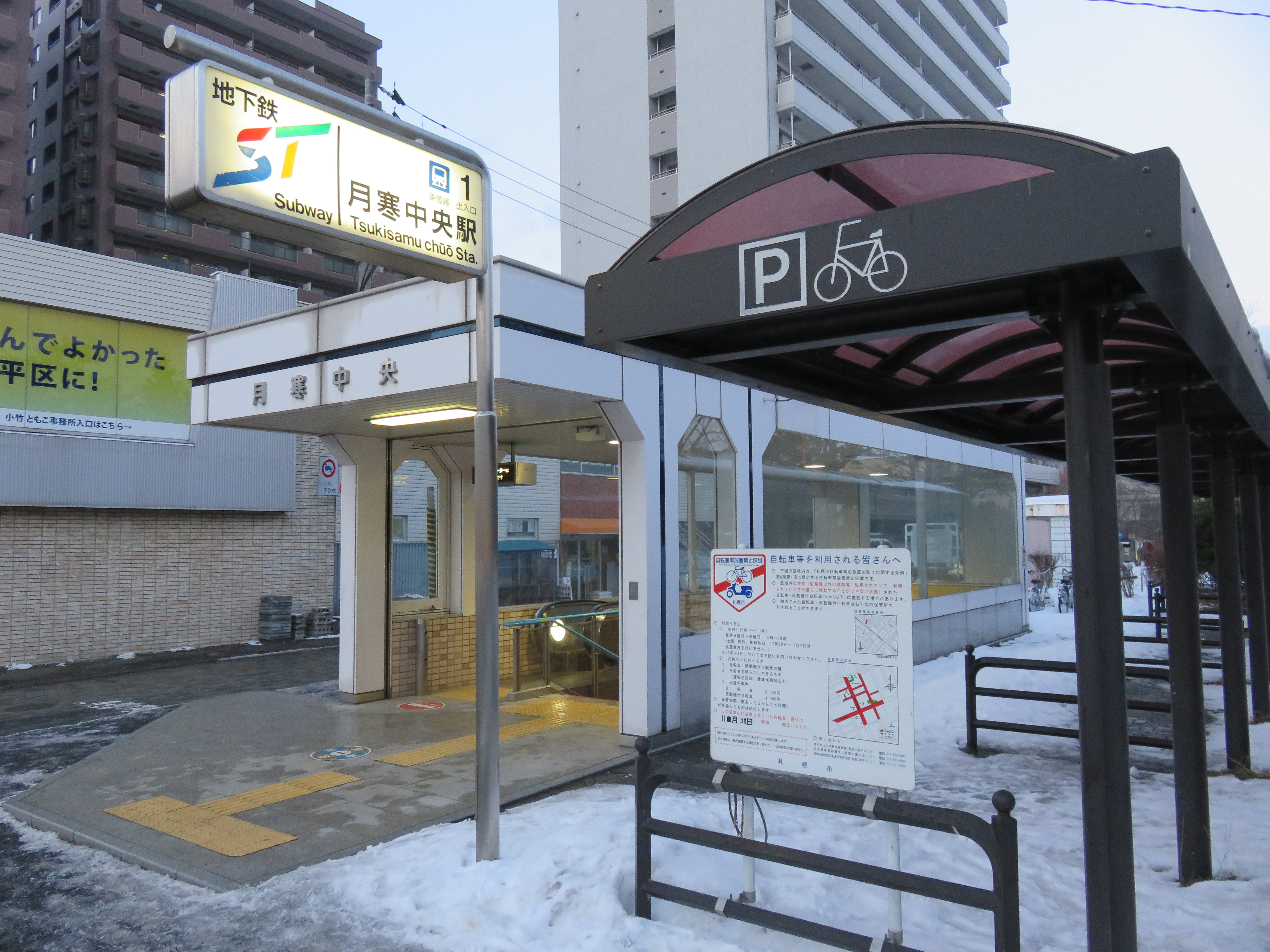 月寒中央駅1番出入口